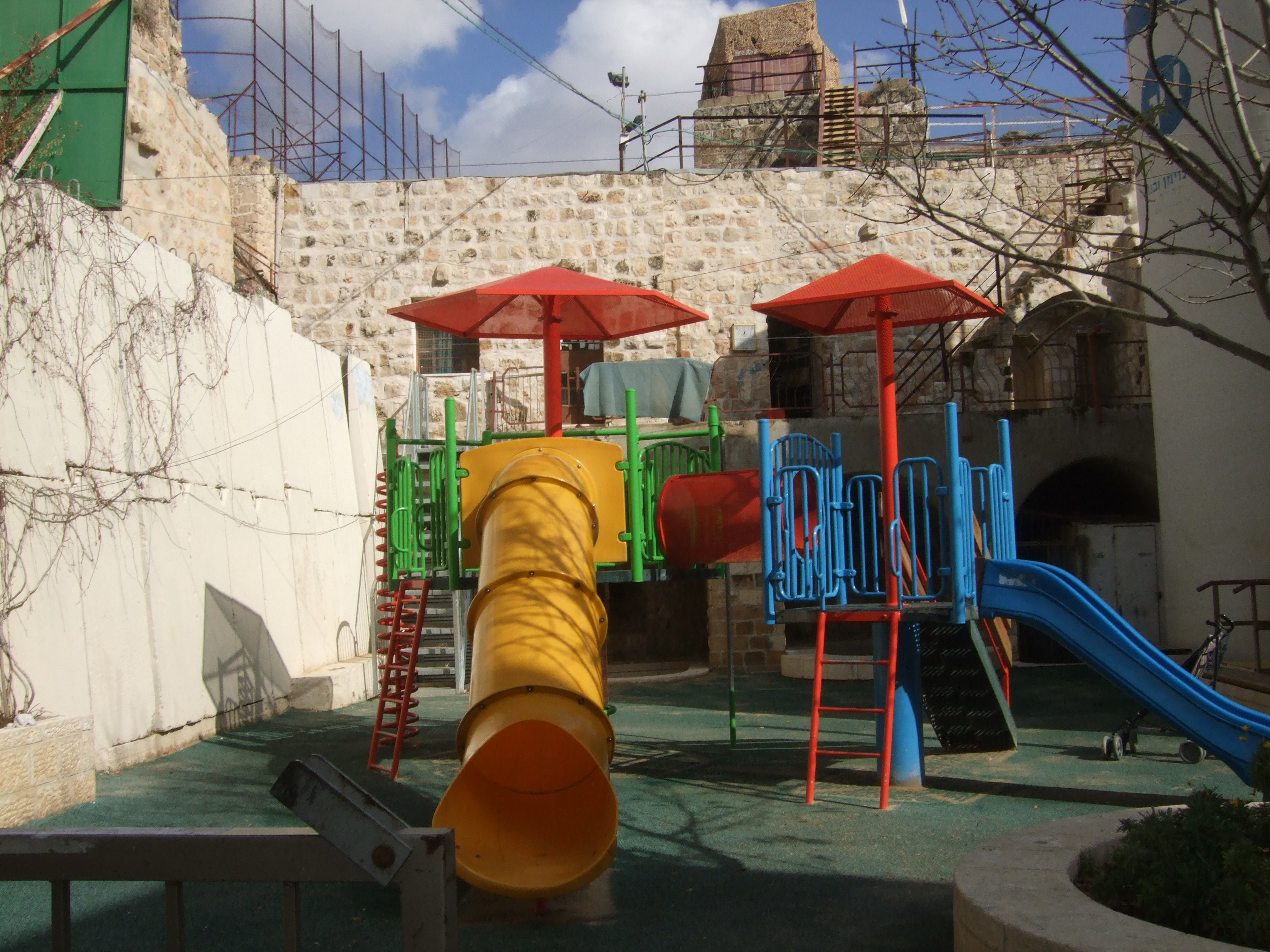 גן ילדים בישוב היהודי בחברון, ינואר 2012